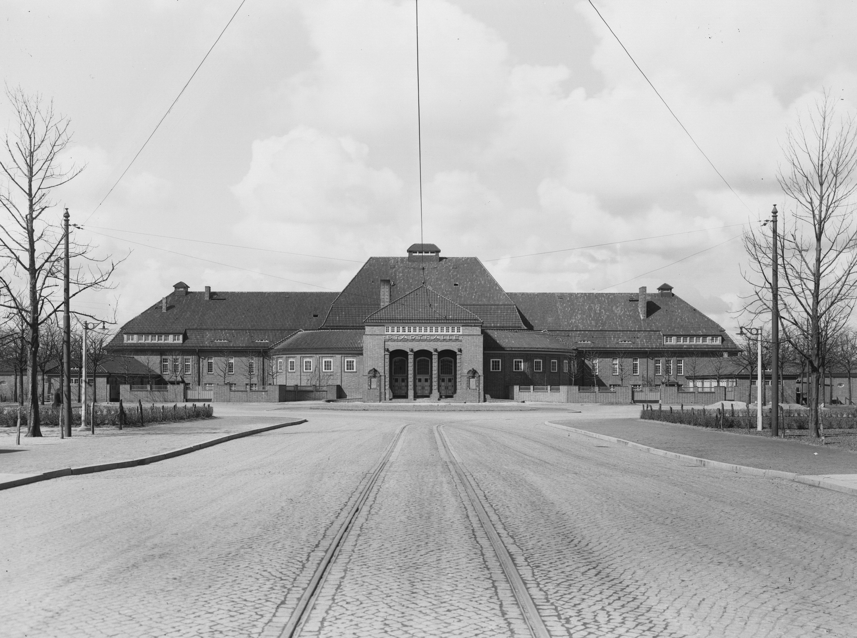 Stadthalle [Hauptrestaurant im Stadtpark] (Hamburg-Winterhude): Ansicht Hauptfront SchumacherWV Nr. 146